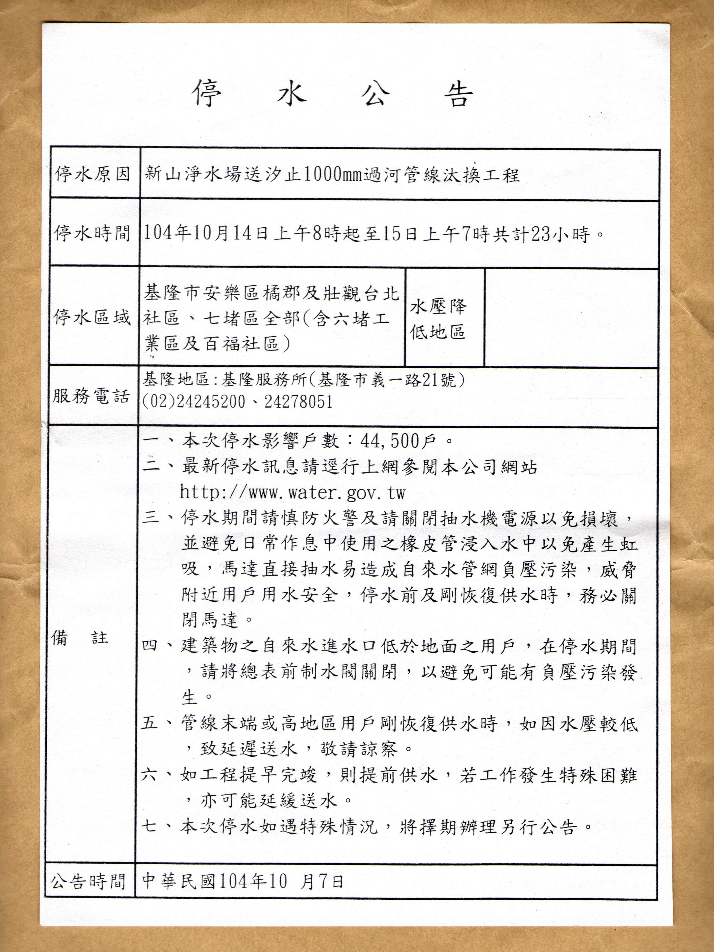 2015年10月7日臺灣自來水公司基隆服務所停水公告。